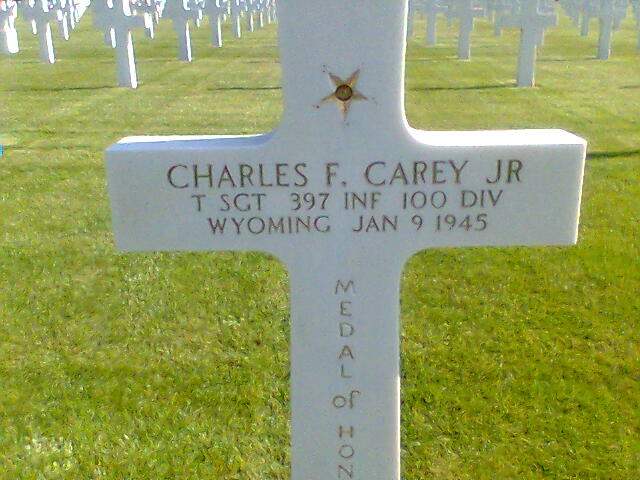 Photo de la tombe de Charles F. Carey JR